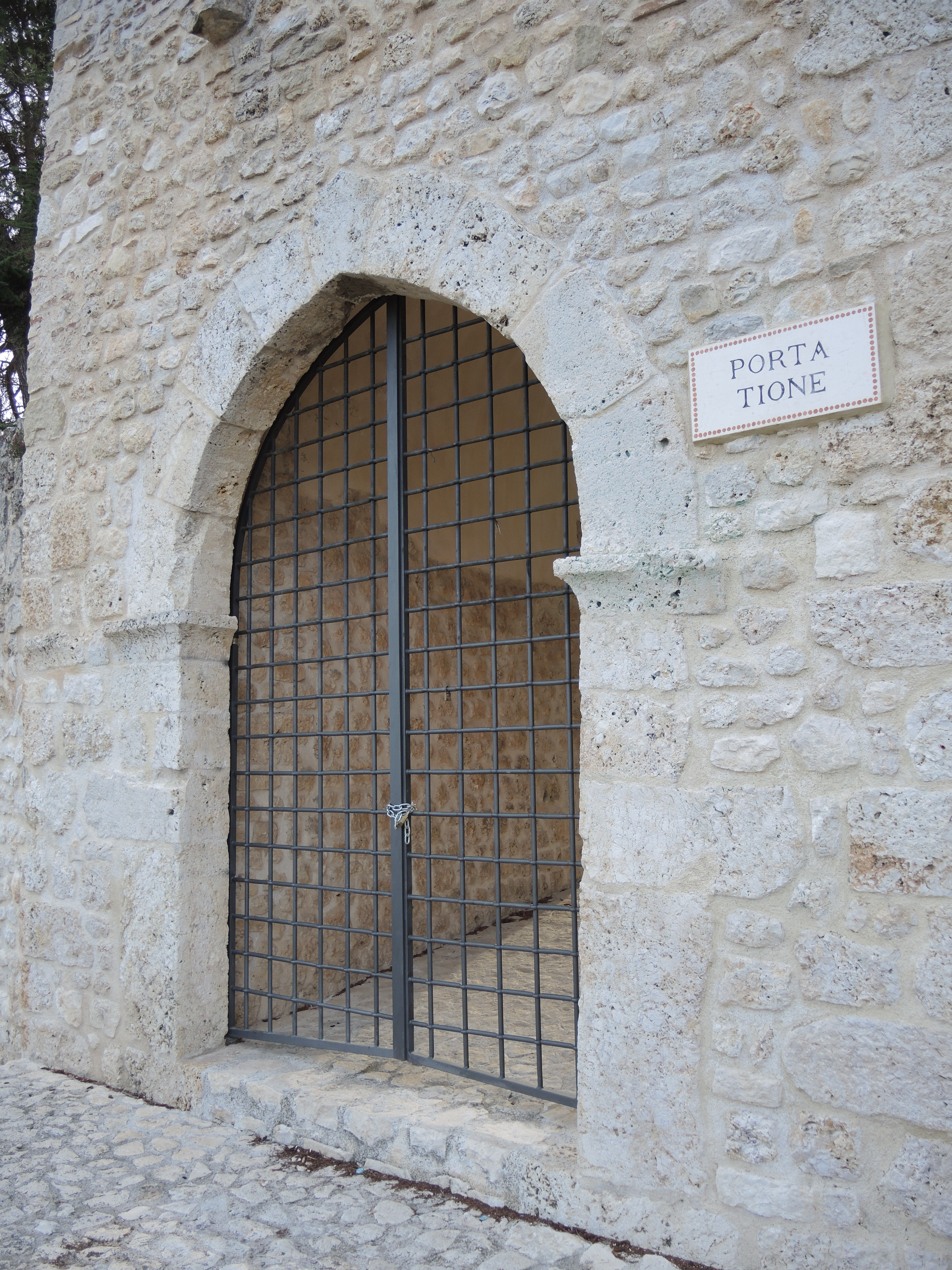 L'Aquila: Porta Tione